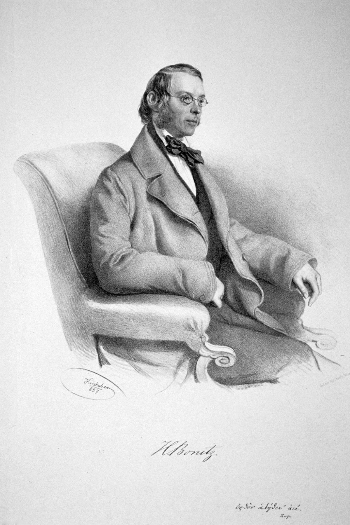 Hermann Bonitz (1814-1888), Altphilologe, Schulreformer Lithographie von Josef Kriehuber, 1857